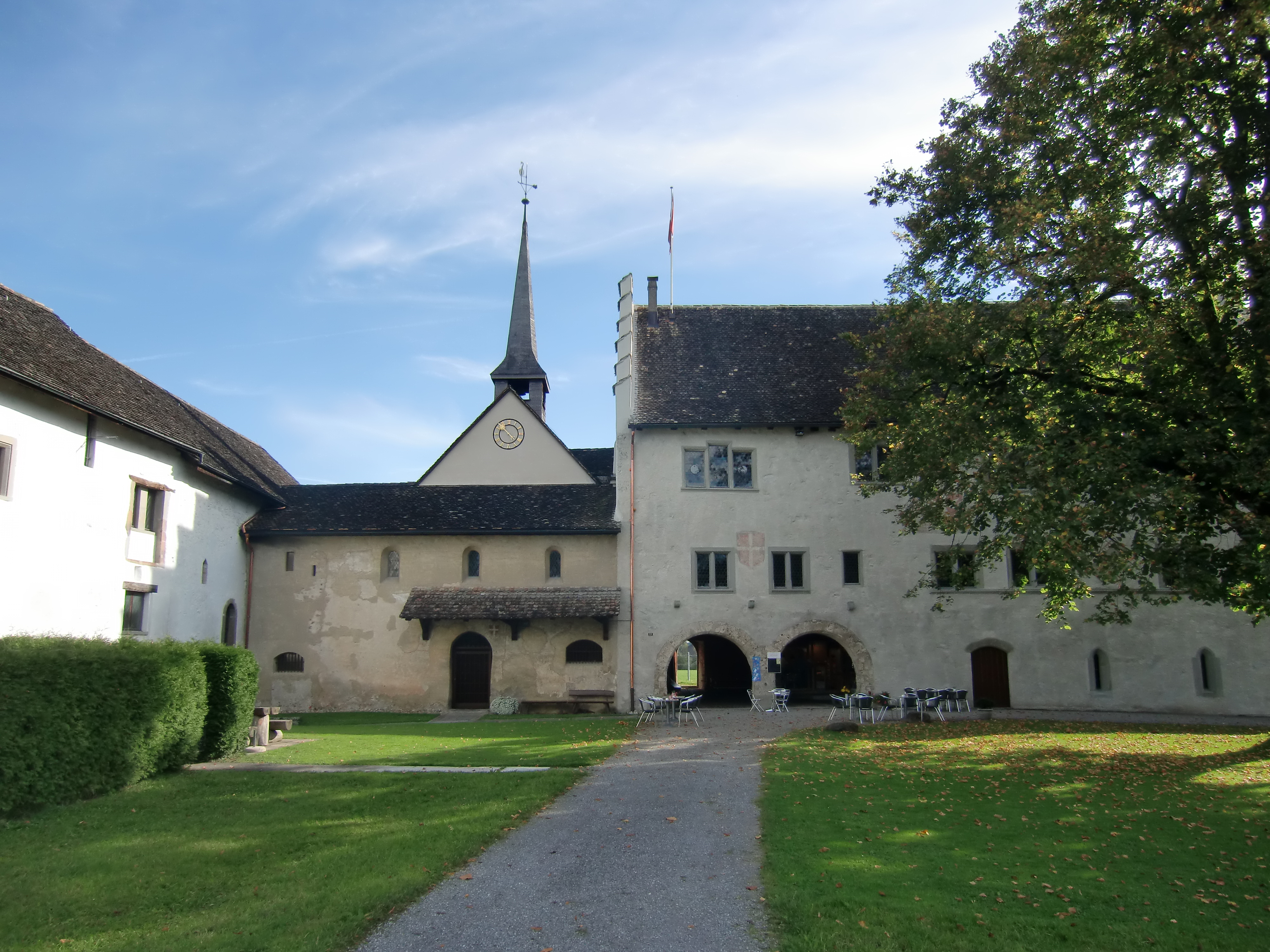 Der Hof des Ritterhauses Bubikon nach der Aussenrenovation 2010